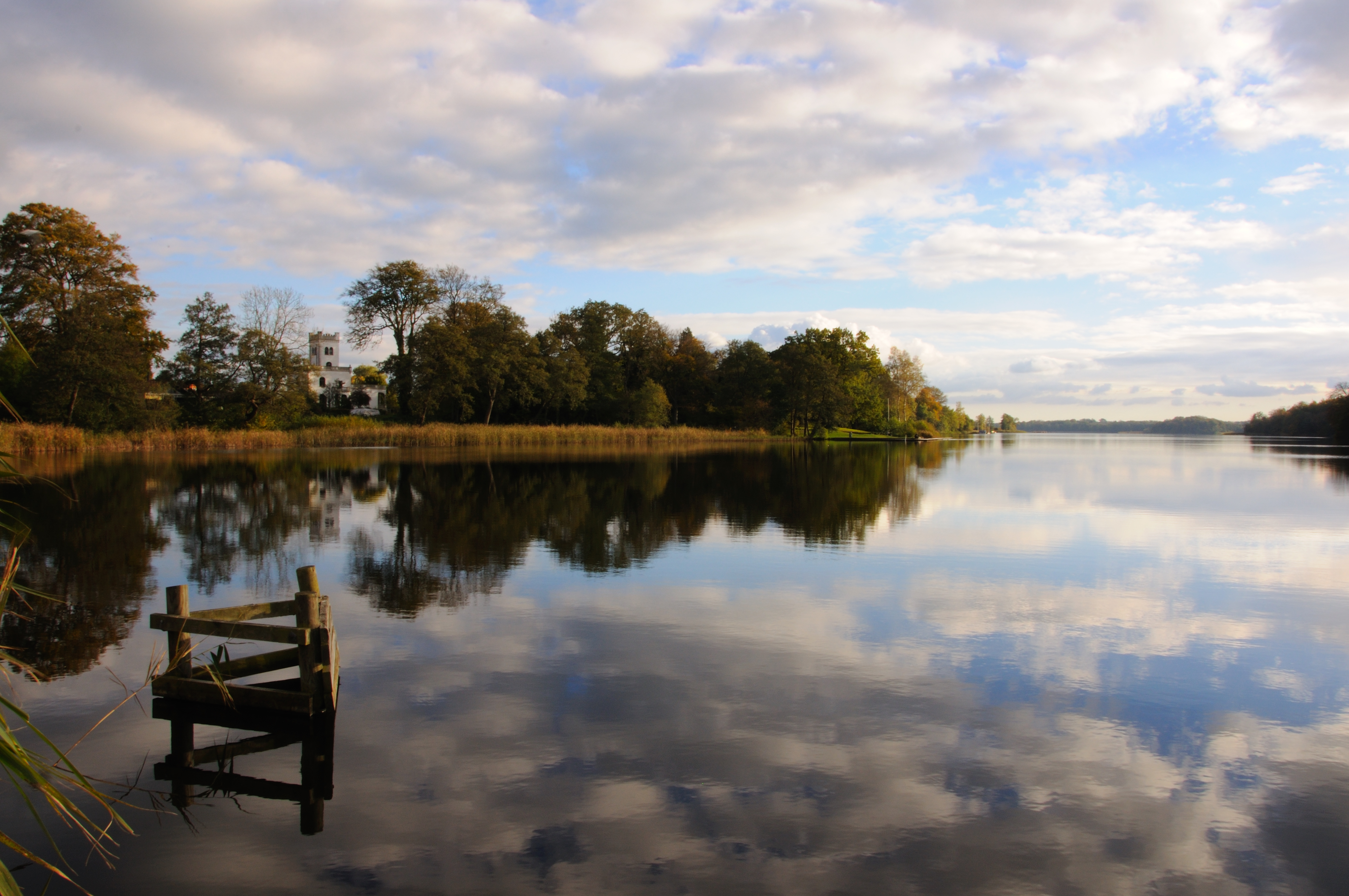 Sorø Sø